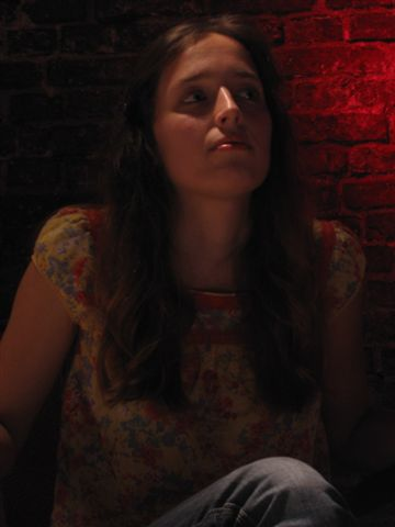 Joanna Wajs (b. 1979), Polish poet